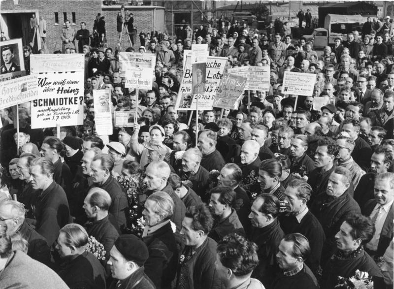 Lager Friedland Oktober 1955 "Wer weiß etwas über ...?" "Wer kennt meinen Mann...?" "Wer war mit meinem Sohn zusammen?" Die große Frage in Friedland an die Heimkehrer, auf die die sich seit Jahren sorgenden Frauen und Mütter Antwort erhoffen. Heimkehrer im Lager Friedland, Besuch des Bundespräsidenten in Friedland 17.-19.10.1955